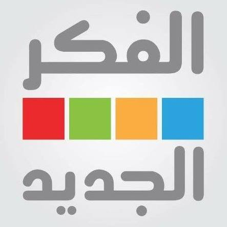 الفكر الجديد